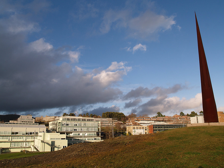 Campus da Universidade de Santiago de Compostela